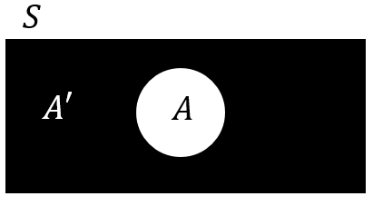 کشیدن تصویر متمم